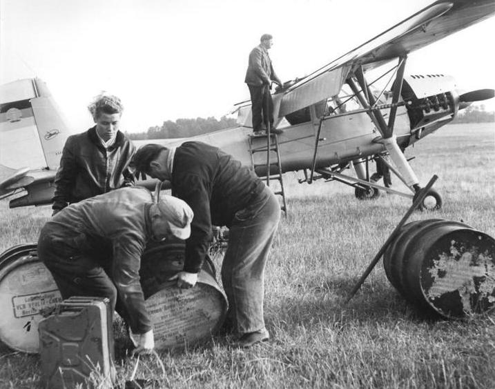 Agrarflieger zur Kartoffelkäferbekämpfung Zentralbild Siegert Nl-At. 2.7.1964 Bezirk Dresden: Kartoffelkäferbekämpfung vom Flugzeug aus. Erstmalig wurde in den Kreisen Riesa und Meißen die Bekämpfung des Kartoffelkäfers vom Flugzeug aus vorgenommen. Auf unserem Foto wird das Sprühmittel in die Maschine, ein Flugzeug vom Typ L 60, getankt. In Riesa wurden 1200 ha und in Meißen 2700 ha mit dem hochkonzentrierten Dimuxan besprüht. Die Genossenschaftsbauern sprachen sich sehr lobend über die gute und preisgünstige Arbeit aus. Der Hektar kostet 1.- DM.